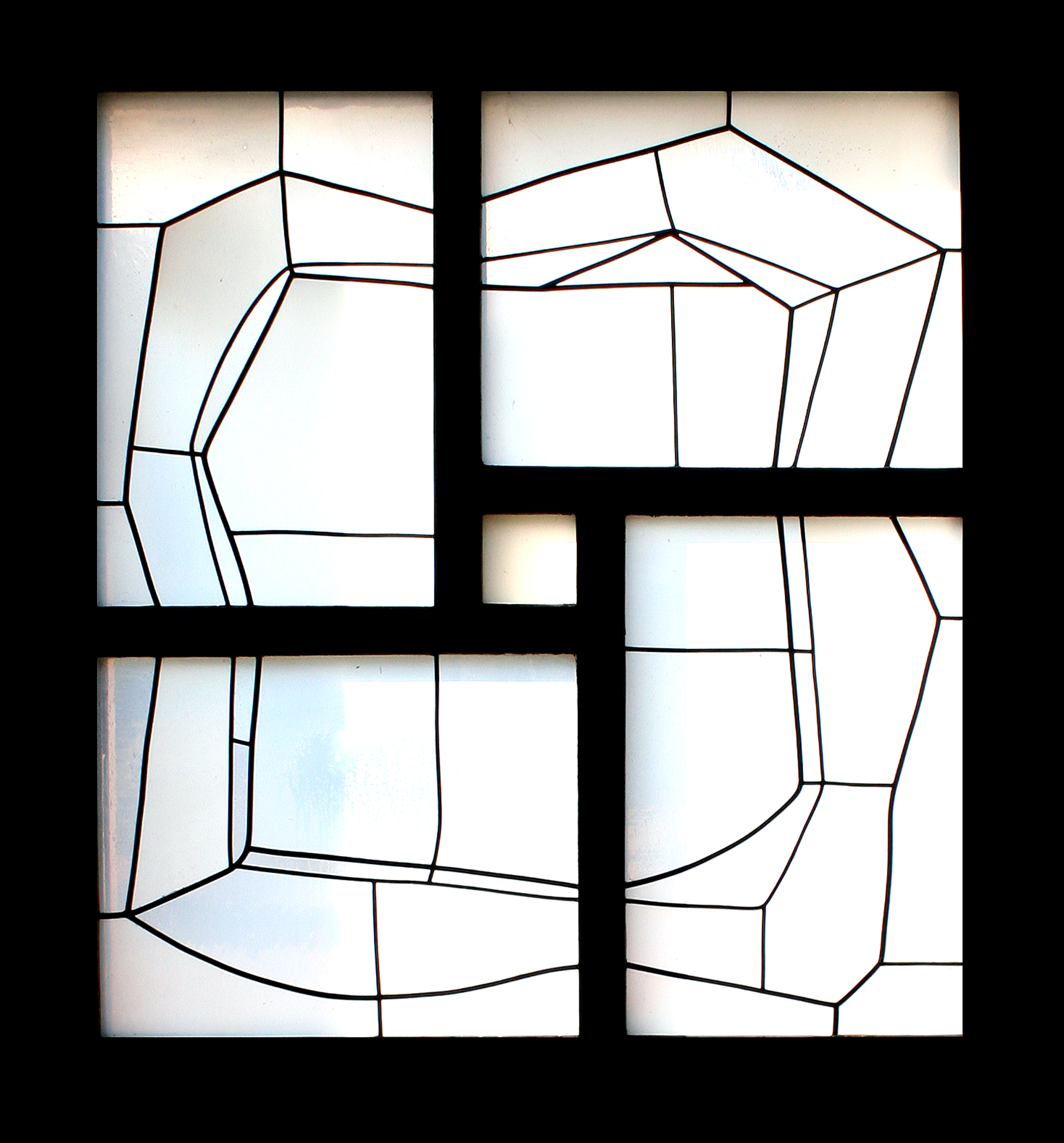 Römisch-katholische Kirche St. Gallus Fischenthal ZH, Werk von Paul Stöckli